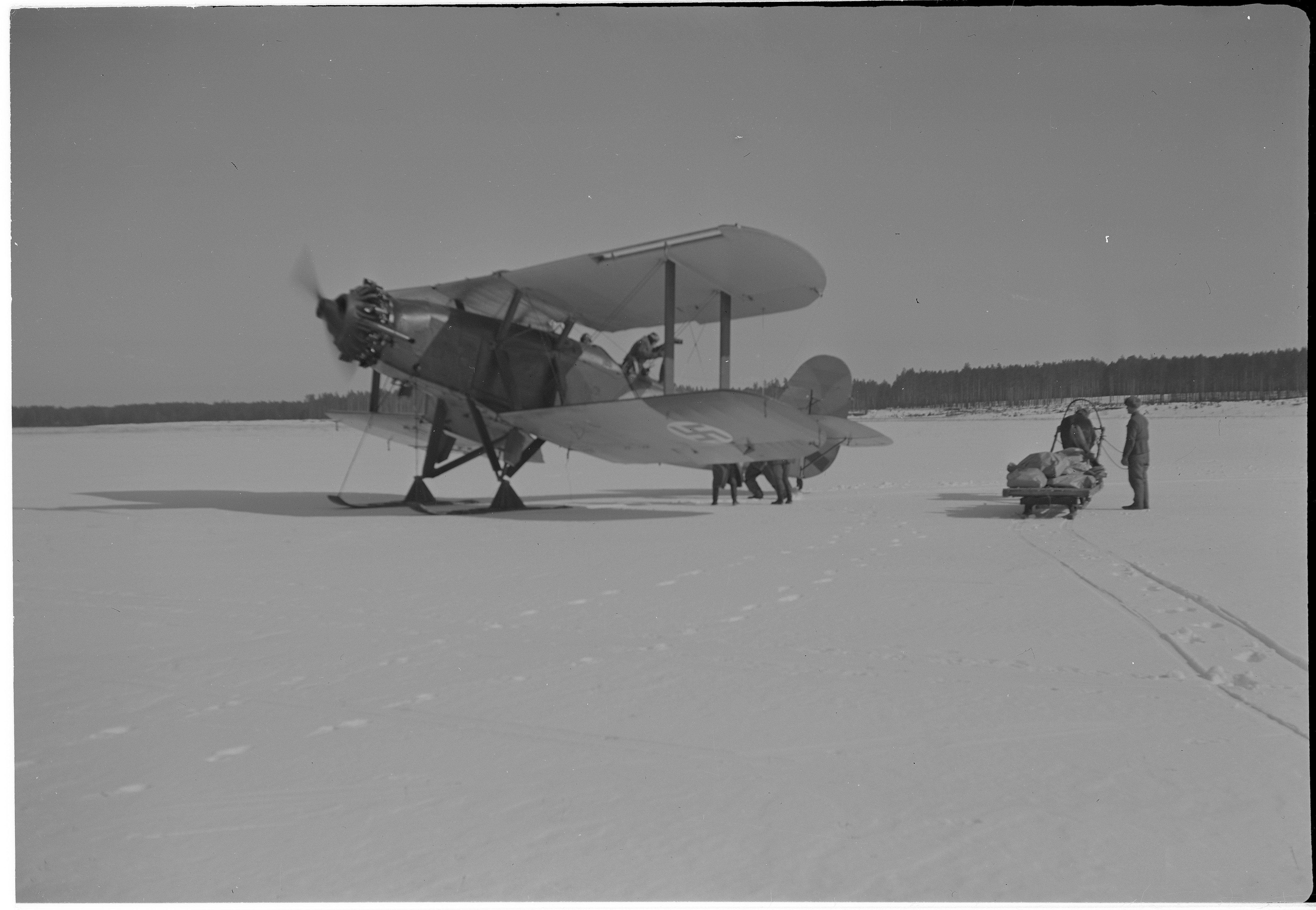 Postin kuljetusta hevoskyydillä ja lentokoneella. (Kuvassa on Blackburn Ripon IIF). Kuvauspaikka: Käkisalmi